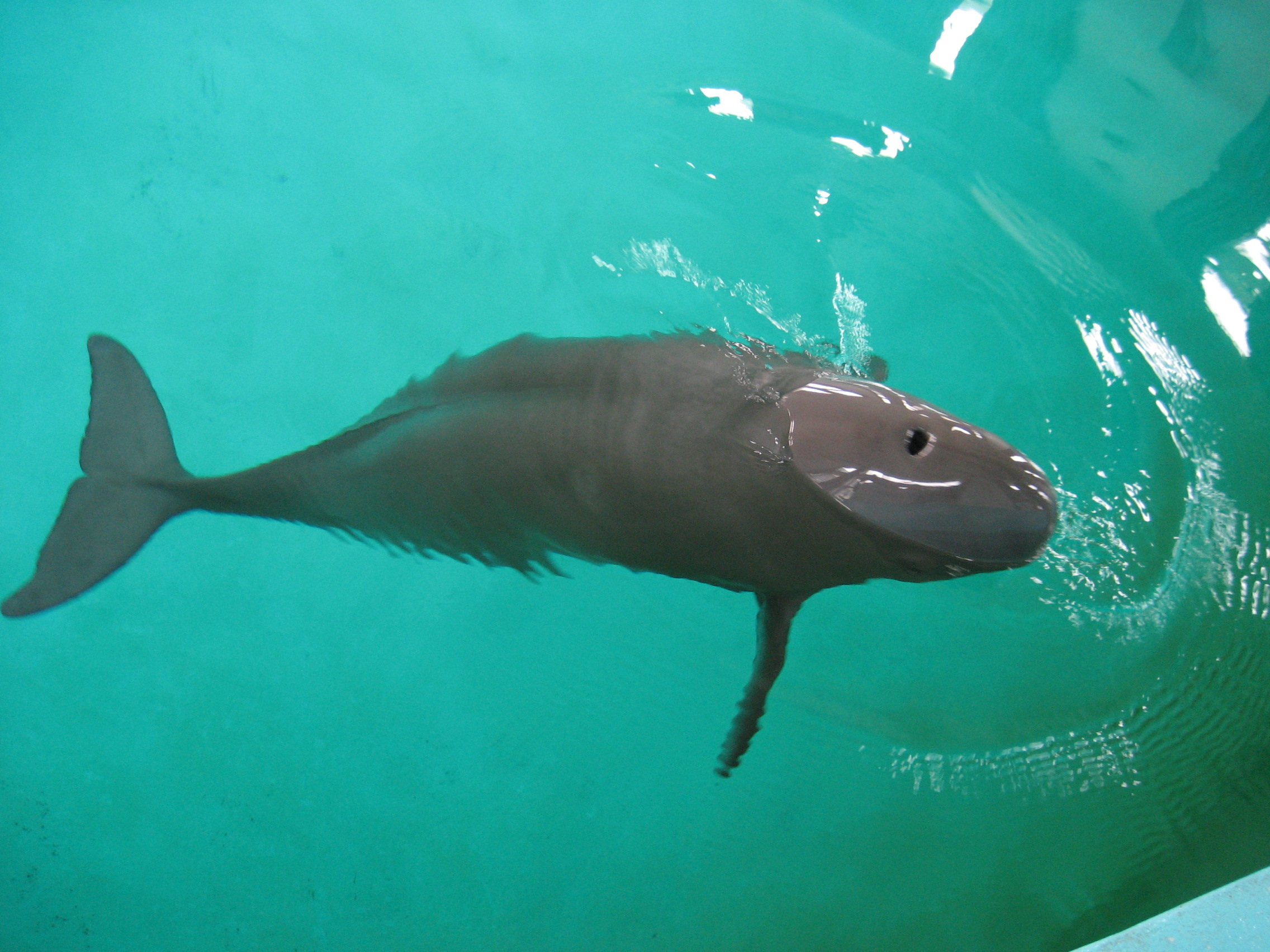 揚子江スナメリその１